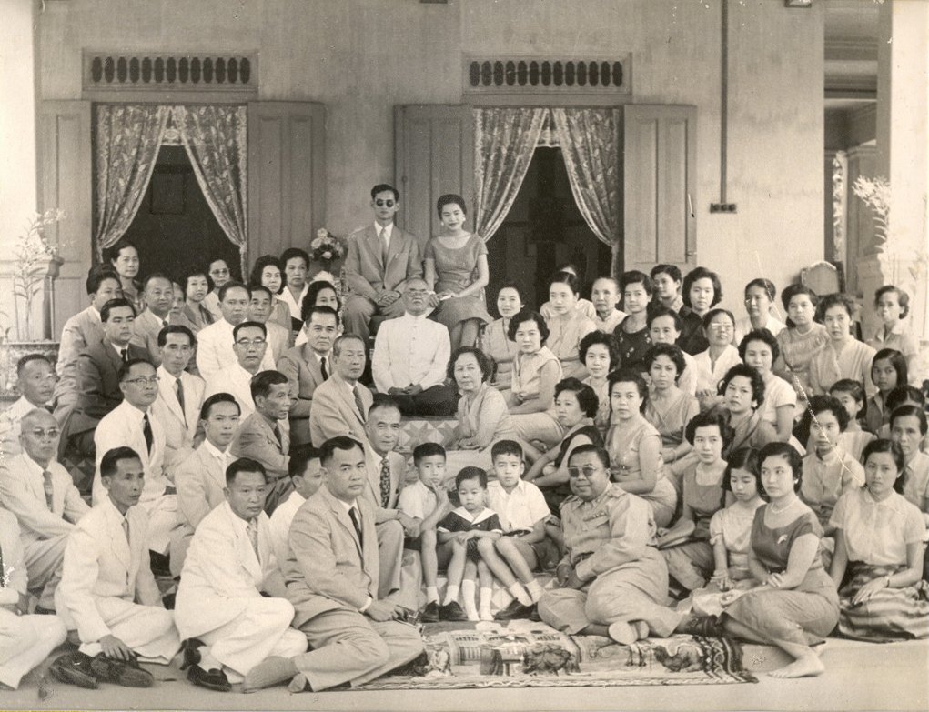 พระบาทสมเด็จพระเจ้าอยู่หัว และสมเด็จพระนางเจ้าฯ พระบรมราชินีนาถ โปรดเกล้าฯ ให้ทายาทเจ้าผู้ครองนครเชียงใหม่องค์สุดท้ายและเจ้านายฝ่ายเหนือเข้าทูลละอองธุลีพระบาท ณ คุ้มวงษ์ตะวัน อำเภอเมือง จังหวัดเชียงใหม่ พ.ศ.2501